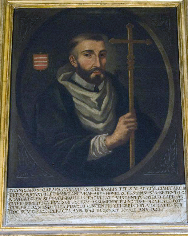 Francesco Carafa arcivescovo